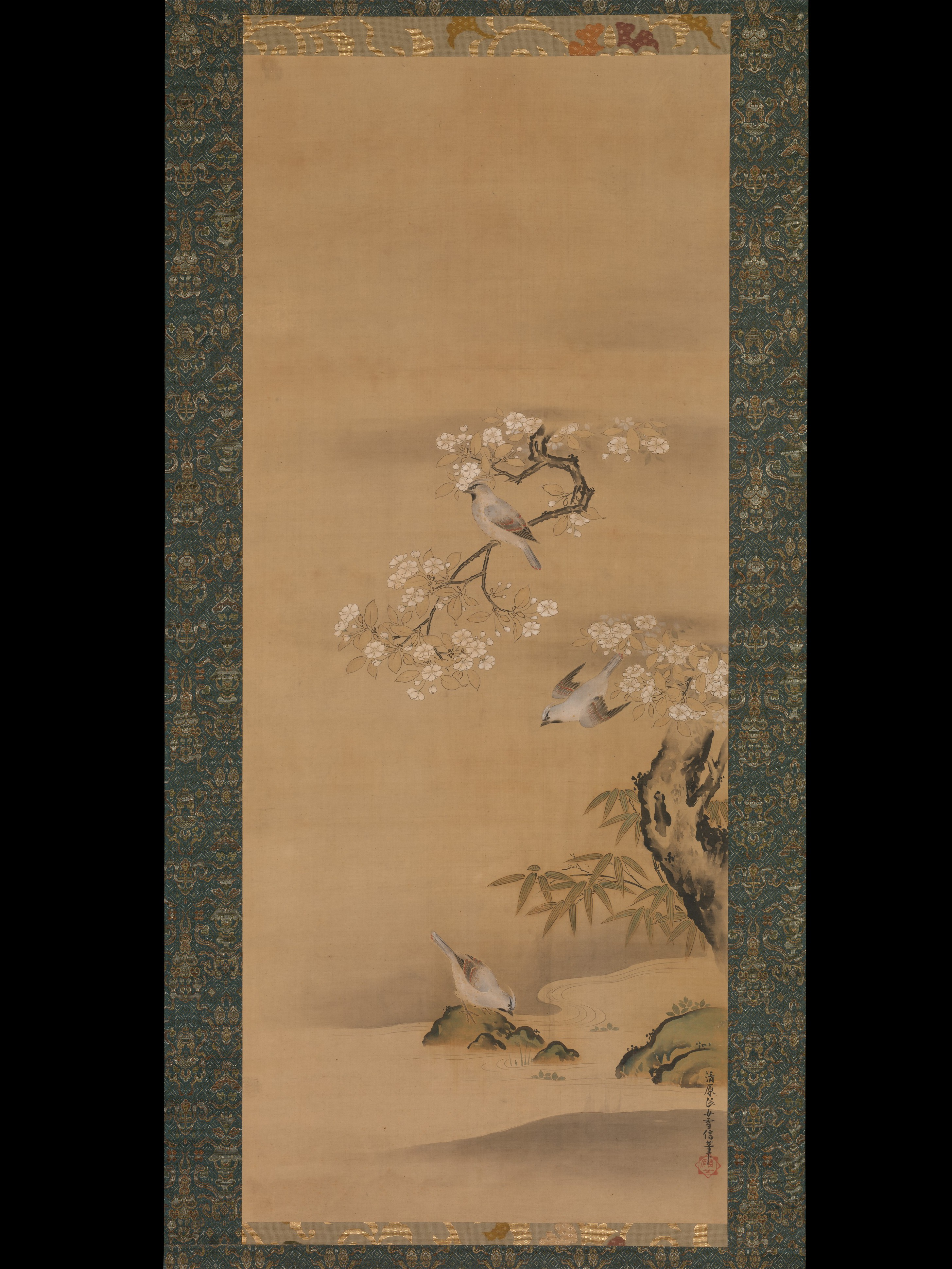 Japan; Hanging scroll; Paintings